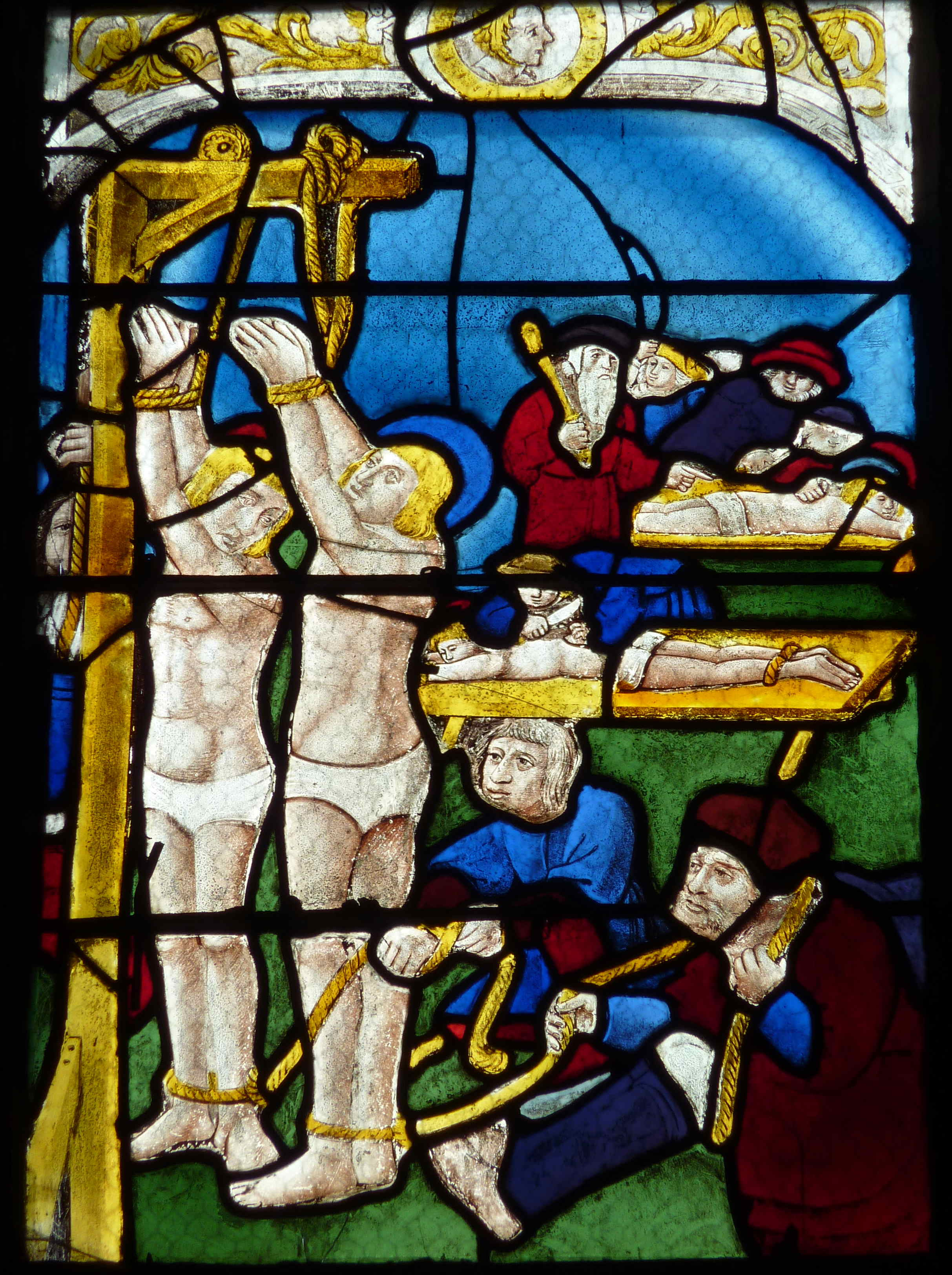 Katholische Kirche Saint-Pierre in Dreux im Département Eure-et-Loir (Centre-Val de Loire/Frankreich), Bleiglasfenster aus dem 16. Jahrhundert in der Kapelle Saint-Crépin und Saint-Crépinien; Darstellung: Martyrium der Brüder Crispinus und Crispinianus (Ausschnitt)